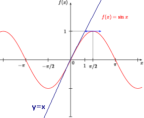 Η συνάρηση συνημίτονο μαζί με την ταυτοτική συνάρτηση.